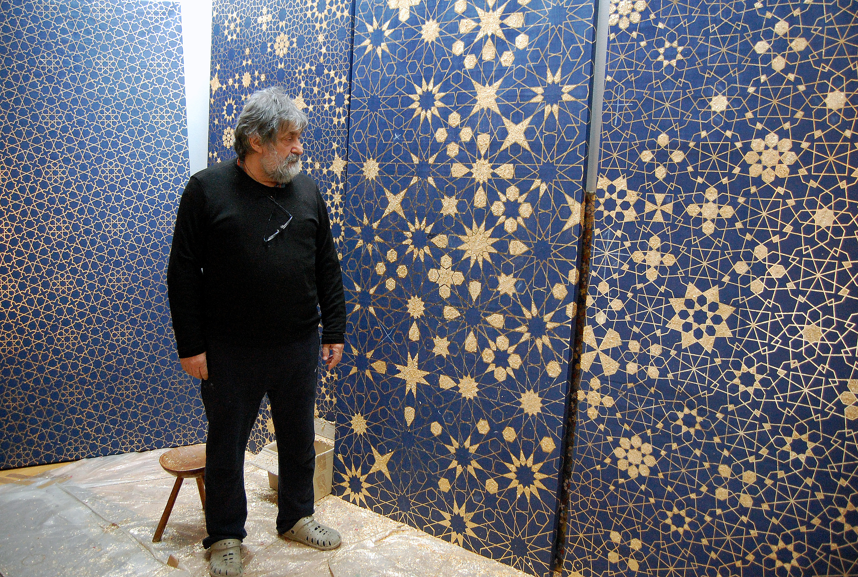 Artistul Silviu Oravitzan în fața unor creații proprii.